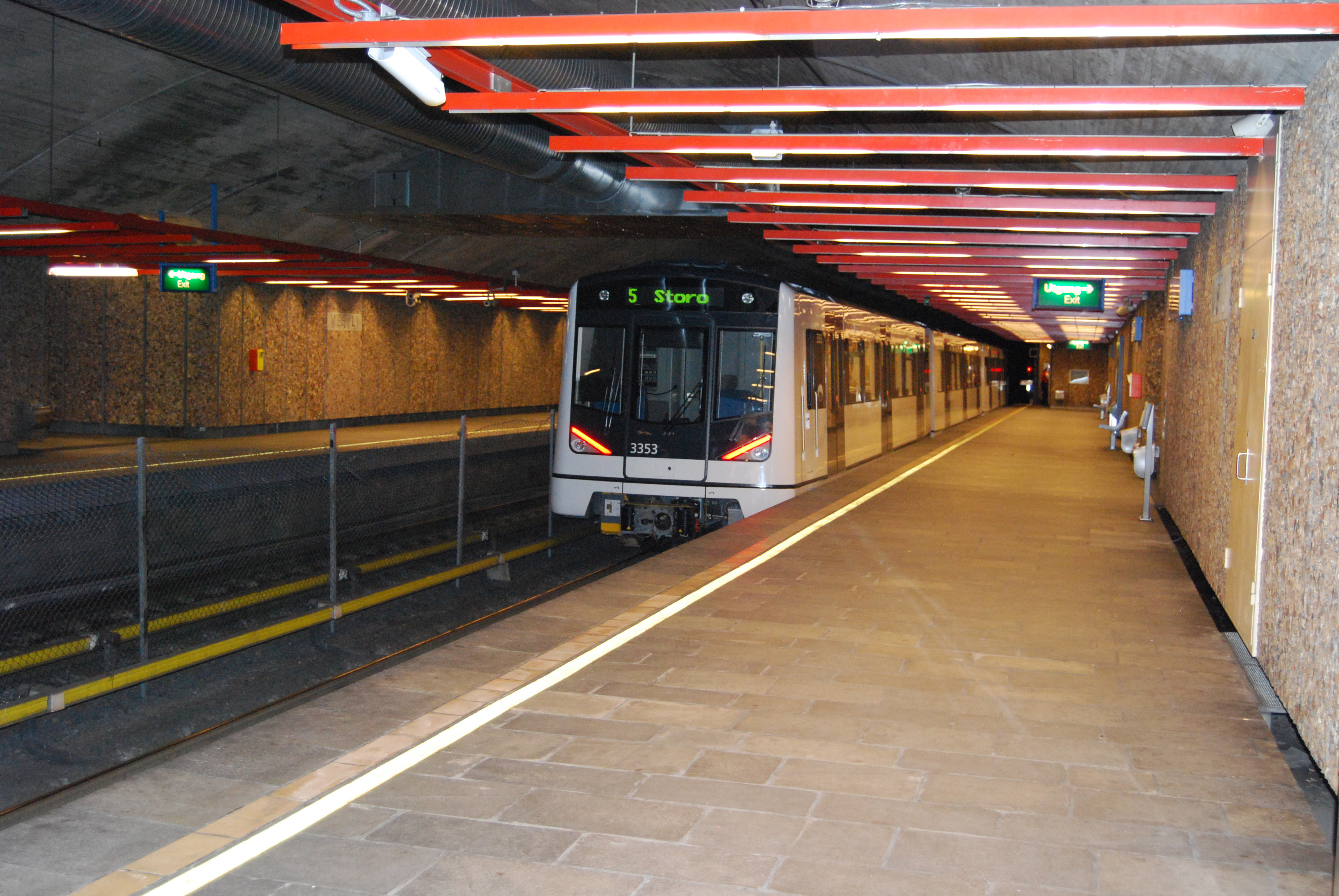 Vestli stasjon (Oslo) 2009 r.